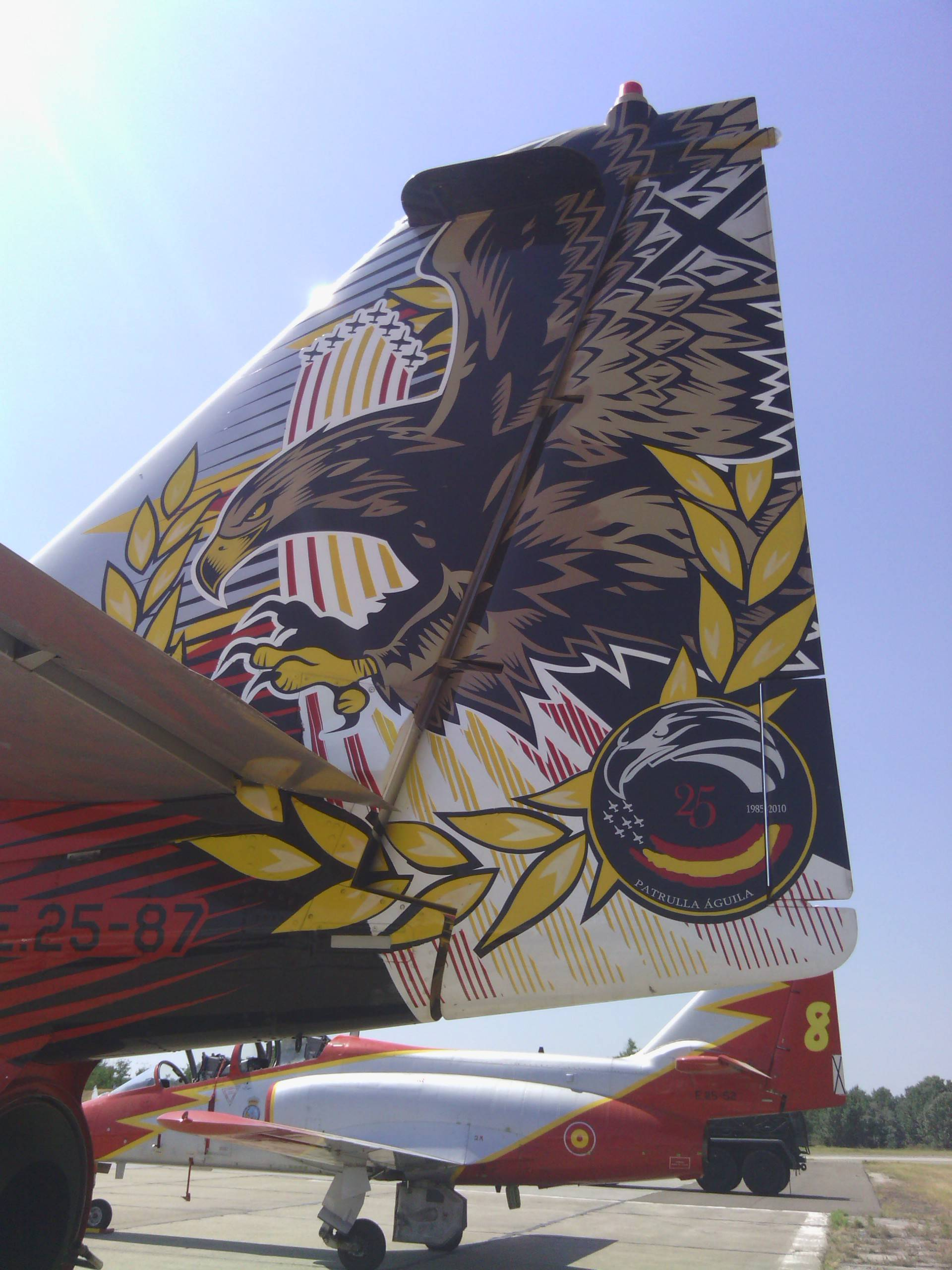 Cola del C-101 de la Patrulla Águila pintada como motivo del 25 aniversario.